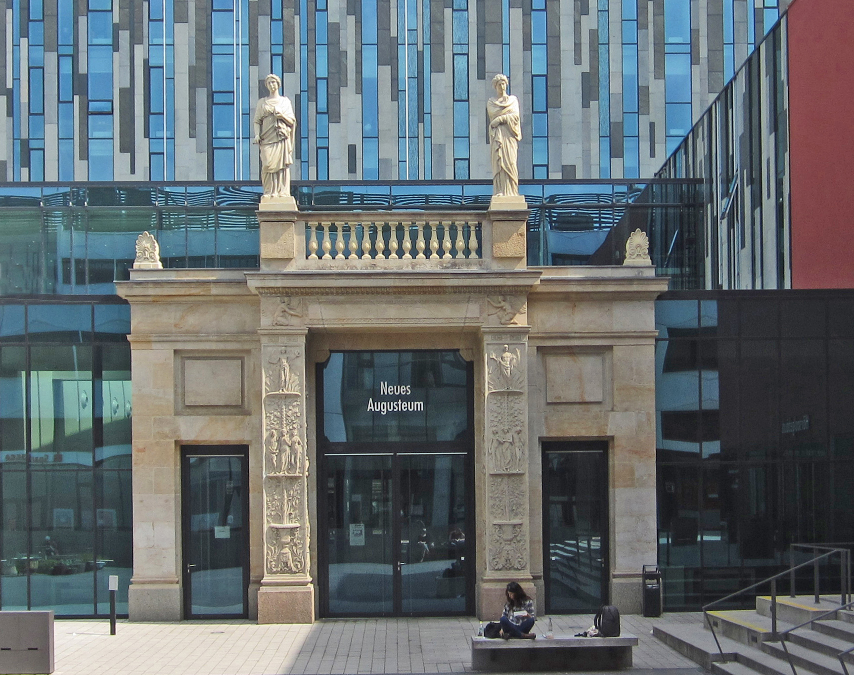 Das klassizistische Schinkeltor von Karl Friedrich Schinkel, das frühere Eingangsportal und heutiger Innenhofzugang zum Neuen Augusteum der Universität Leipzig vom Leibnizforum aus im April 2014.